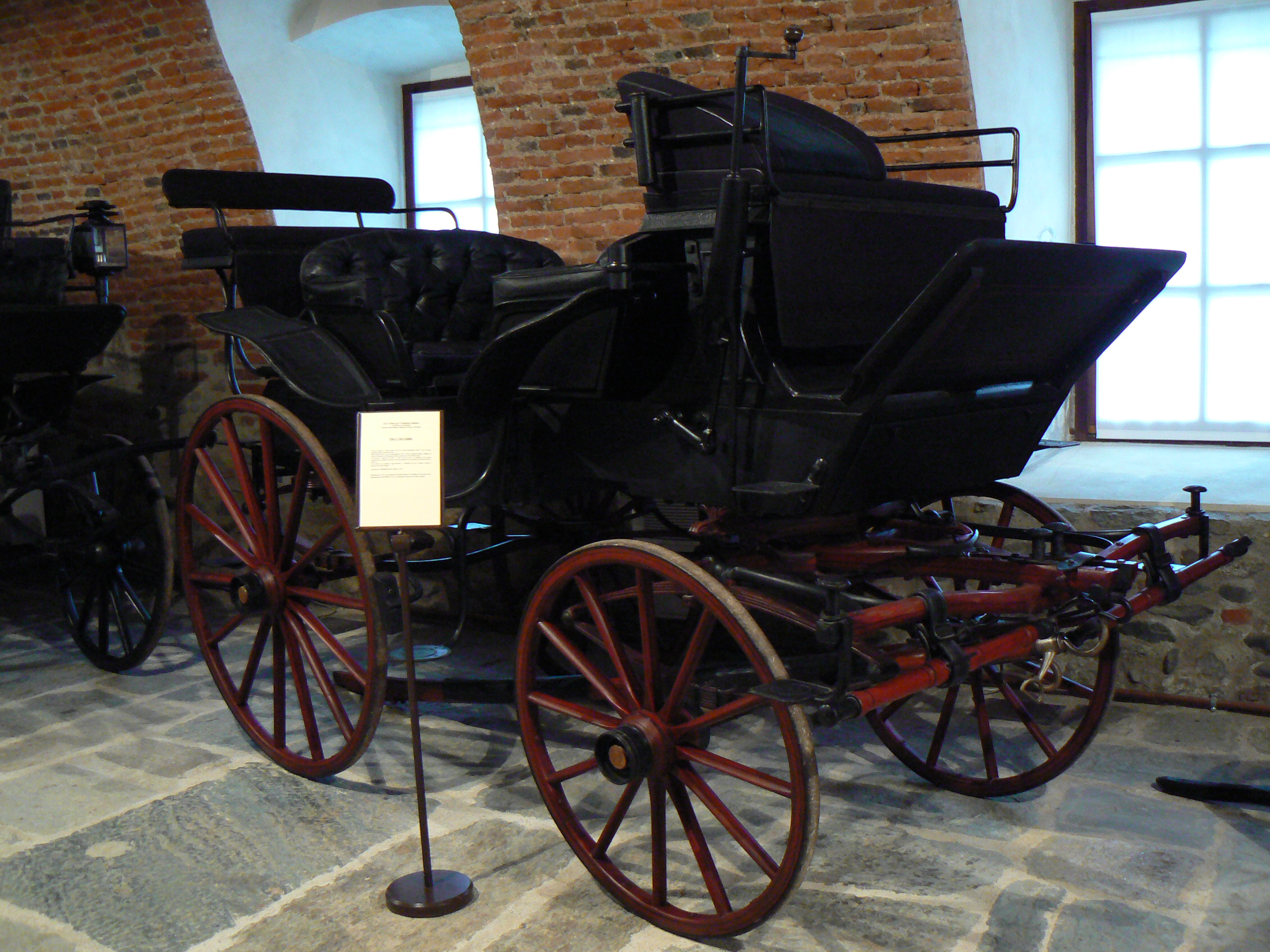 Modello di carrozza detto «Vis-à-vis carré». Vis-à-vis vuol dire faccia a faccia, dalla posizione dei passeggeri, carré vuol dire squadrato, per la forma della carrozza. Questo modello, non molto leggero, era trainato da due o quattro cavalli. L'esemplare conservato al castello di Masino presenta il monogramma di Cesare Valperga di Masino sulle porte : « CVM ». Piuttosto rialzata, la carrozza è dotata di una serpa anteriore per il cocchiere, ed eventualmente il suo aiuto, e da una serpa posteriore a due posti, per altri due lacchè o aiuti. Costruito nel 1850 da Cesare Sala, Milano, l'esemplare manca del mantice presente in origine. Carrozza restaurata nel 1991 dal Laboratorio Fratelli Moirano di Strambino (TO), con finanziamento ATIVA spa (Autostrade Torino-Ivrea-Valle d'Aosta). Conservato al Castello di Masino. Collezione di carrozze della famiglia Valperga di Caluso e di Masino. Fotografa in occasione della Giornata FAI al Castello di Masino, Piemonte, Italia. (Informazioni tratte dal cartellino esplicativo)